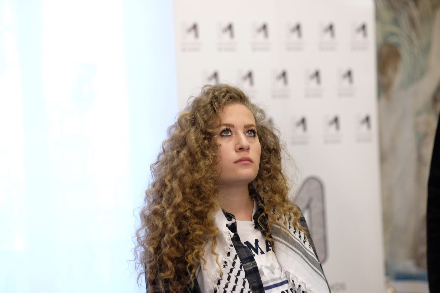 El tercer teniente de alcalde Mauricio Valiente, se ha reunido esta mañana con la activista palestina Ahed Tamimi, en un encuentro en el que ha querido mostrar el compromiso y la solidaridad del Ayuntamiento de Madrid con el pueblo palestino y con los Derechos Humanos y el Derecho Internacional. Valiente ha presentado a Tamimi como “ejemplo de lucha en defensa de los Derechos Humanos en general y de la causa palestina en concreto, representada hoy en ella”.